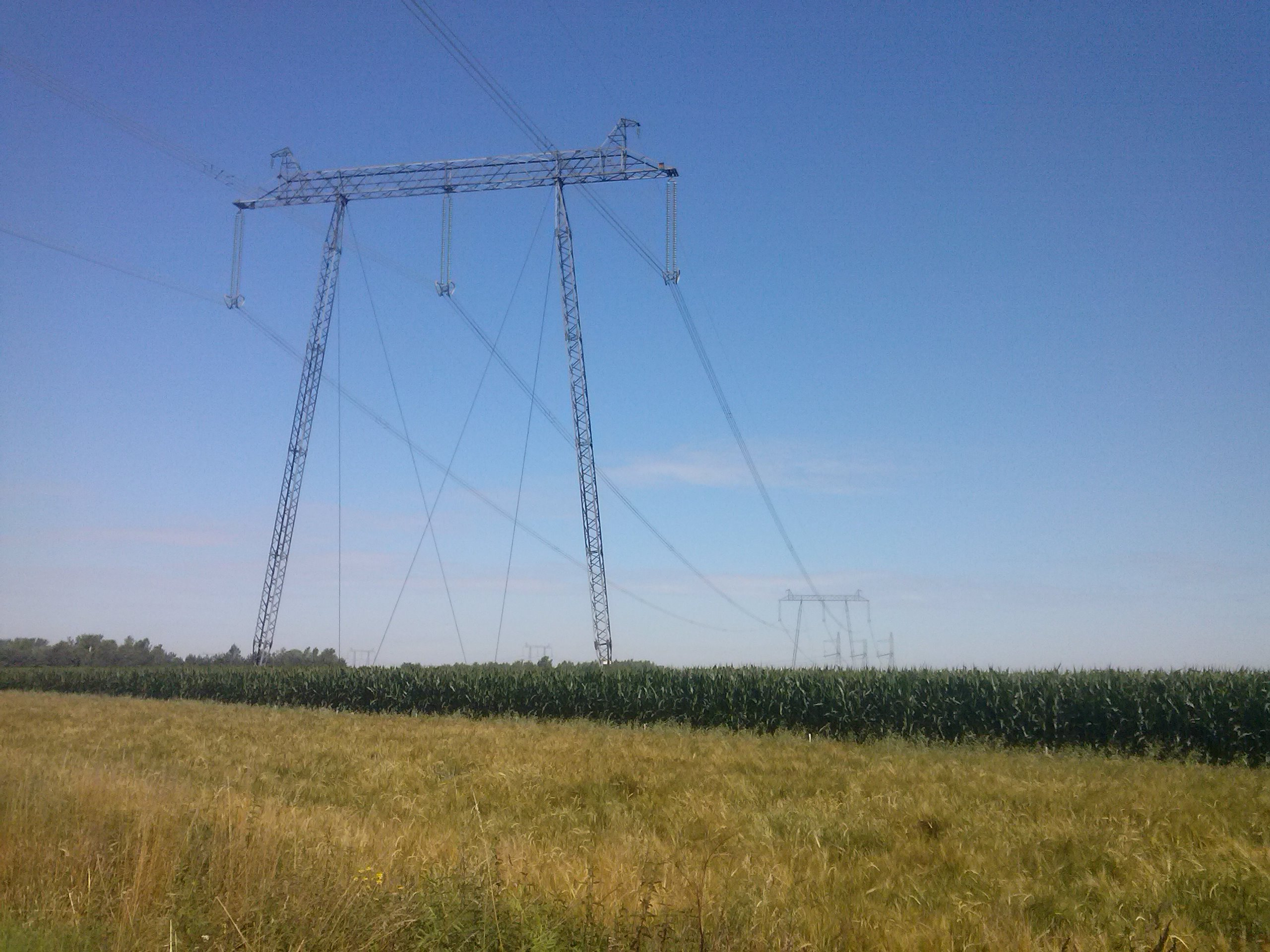 Linia energetyczna 750 kV, obok Sanu